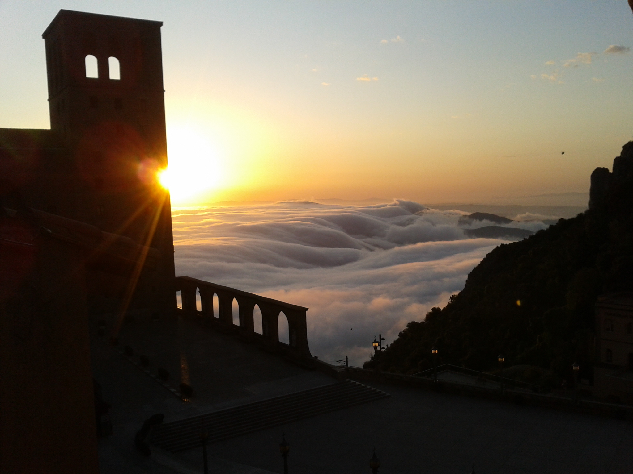 Vista des del Monestir de Montserrat amb la boira plana